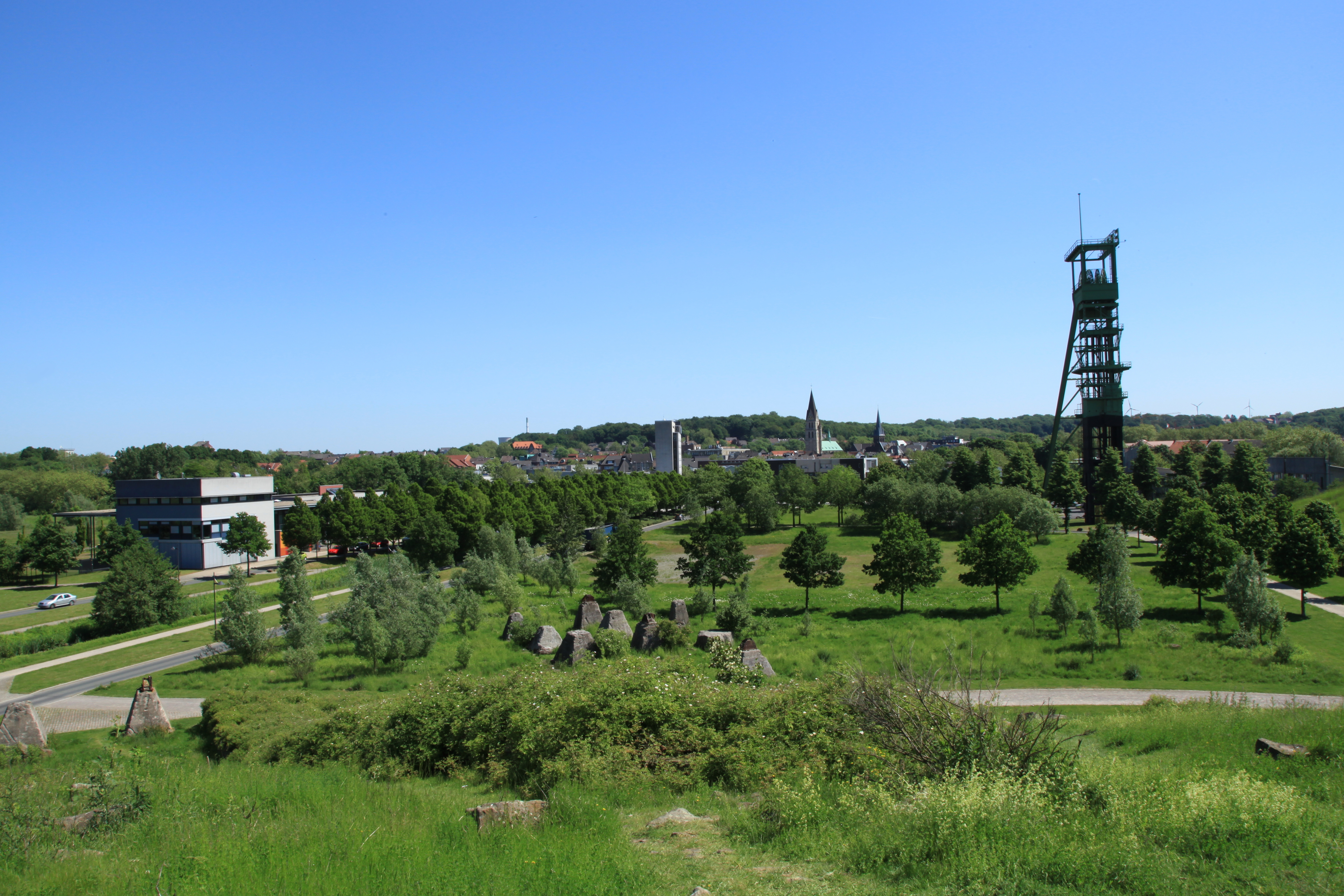 Zeche Erin Schacht 7 im Erinpark an der Erinstraße in Castrop-Rauxel